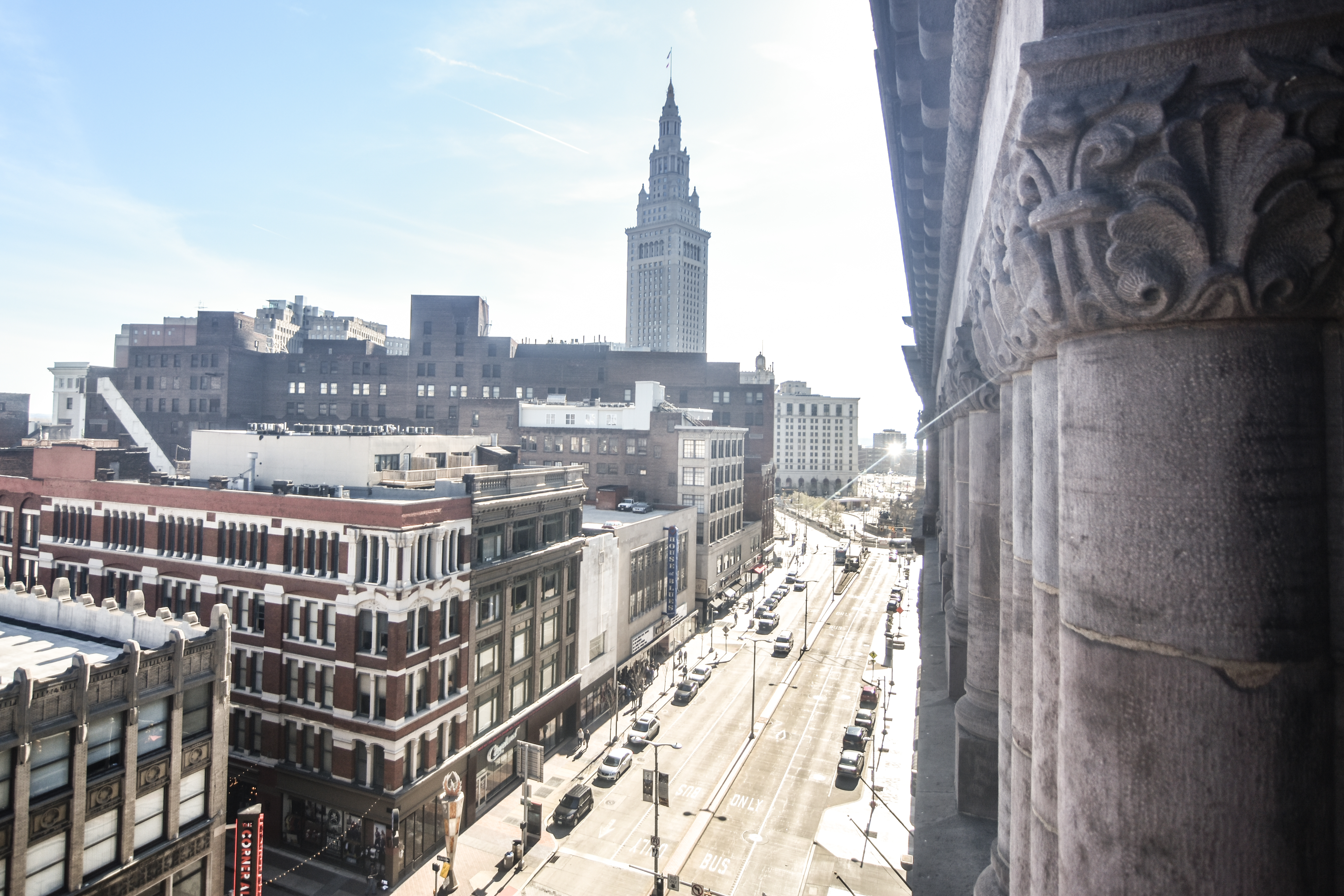 Cleveland Skyline